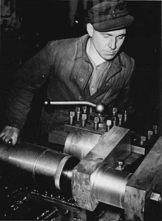 Industriearbeiter Maschine bedienend Zentralbild Paalzow 18.3.52. Begeisterte Zustimmung zum sowjetischen Entwurf eines Friedensvertrages mit Deutschland. Der Aktivist Otto Bege von der Brigade der besten Qualität in den Hallischen Kompressoren- und Pumpenwerken sagt: "Es sind bereits sieben Jahre her seit Beendigung der Kampfghandlungen, und noch immer warten wir auf den uns zustehenden Friedensvertrag. Unsere Regierung hat mir aus dem Herzen gesprochen, wenn sie diesen von den vier Grossmächten fordert. Allein die Sowjetunion unterstützt die gerechte Forderung aller Deutschen, was für mich die Verpflichtung bedeutet, auch meinerseits alles zu tun, was unsere Einheit fördert. So bin ich als Dreher bestrebt, durch die Anwendung der Neuerermethoden meine Leistung zu erhöhen und somit einen wesentlichen Beitrag zur Erfüllung des Friedensplanes zu leisten."